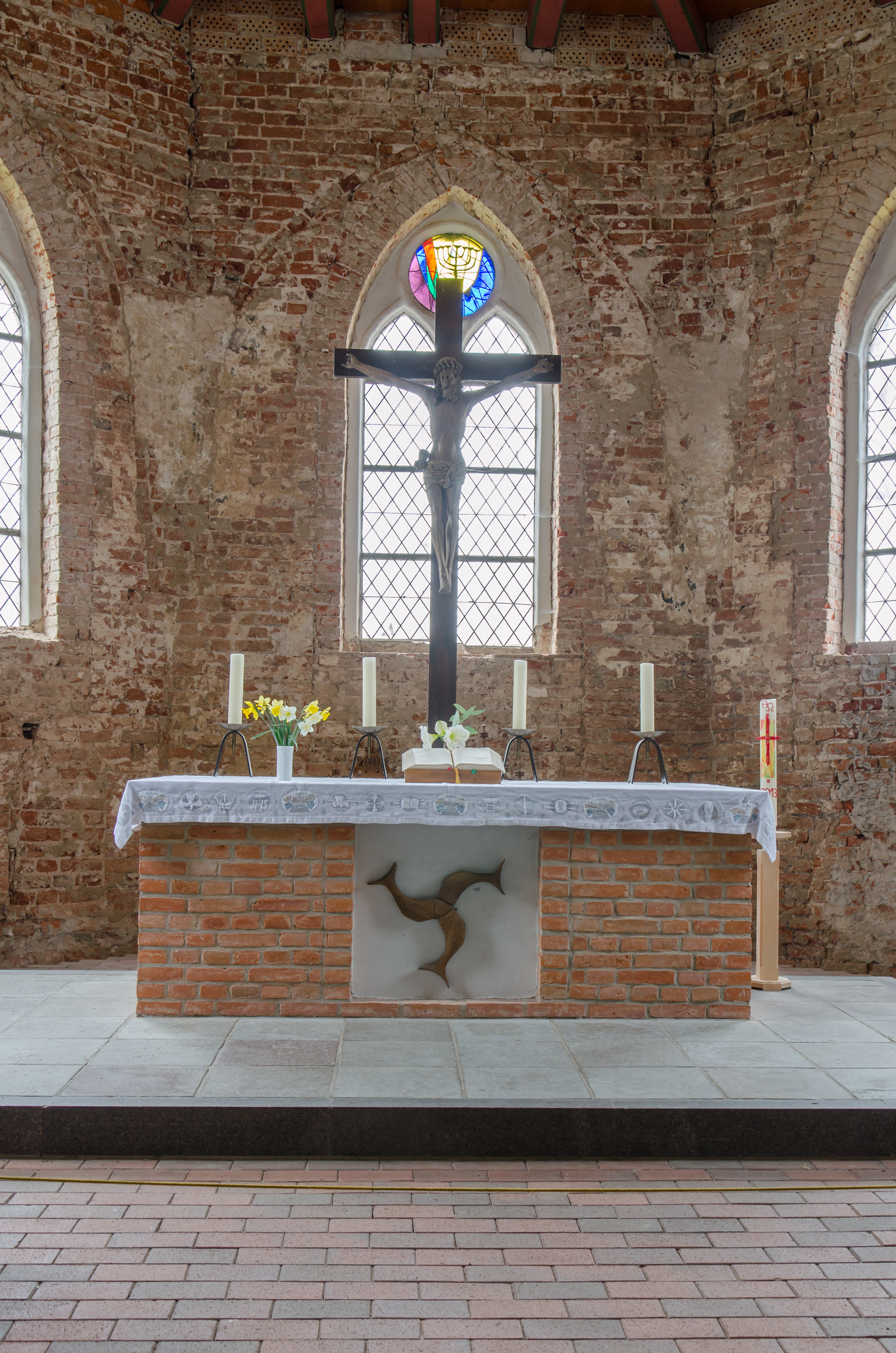 Krummin St, Michael Altar